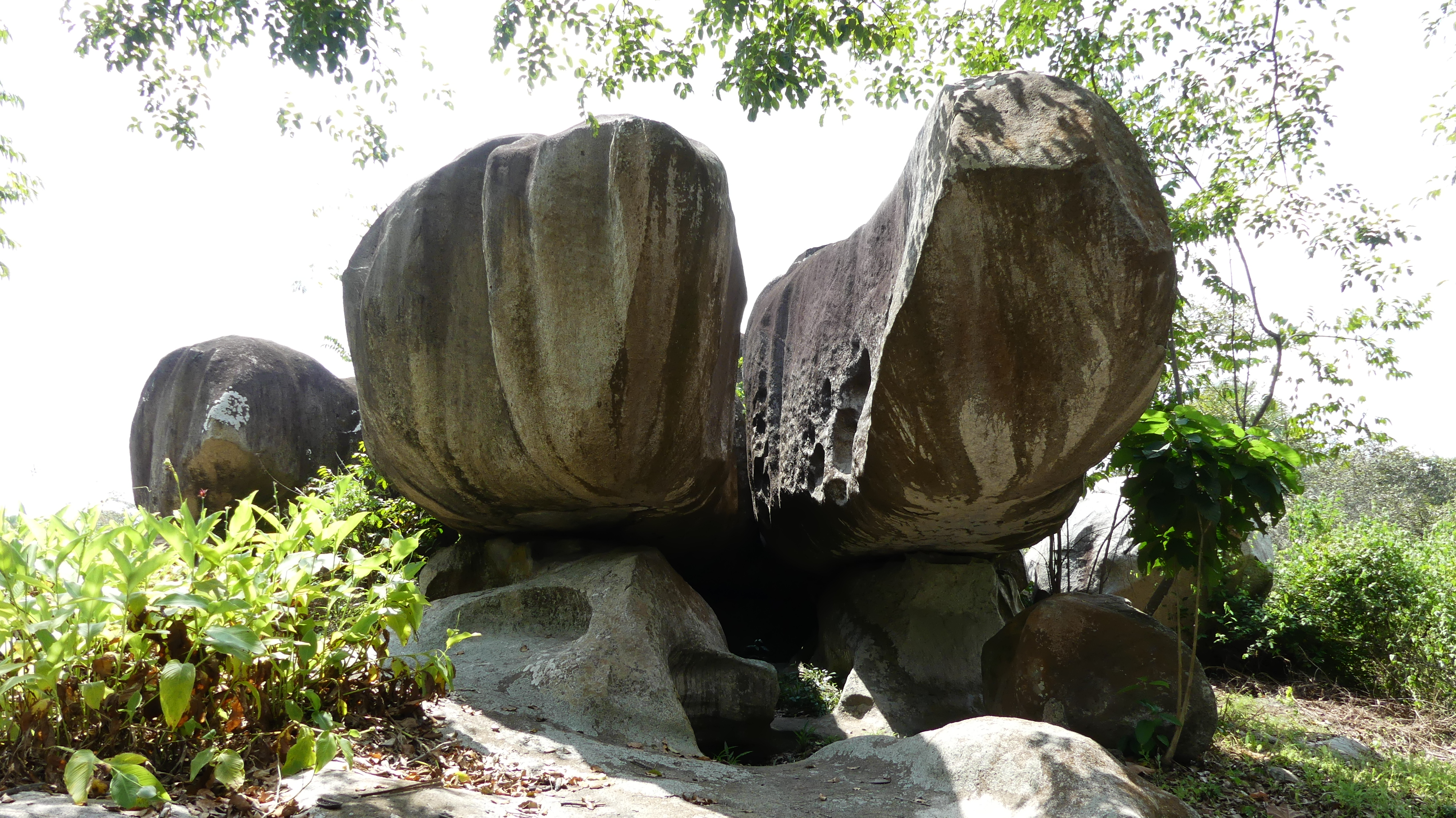 Sur le site d'Ahouakro sont visibles de nombreux rochers ou amas rocheux aux formes originales et pittoresques. Un exemple ici.